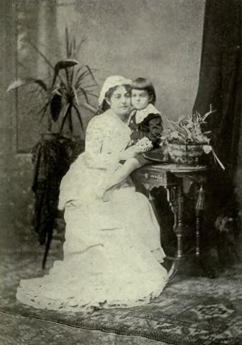 La reina Natalia de Serbia con su hijo Alejandro I en 1879.